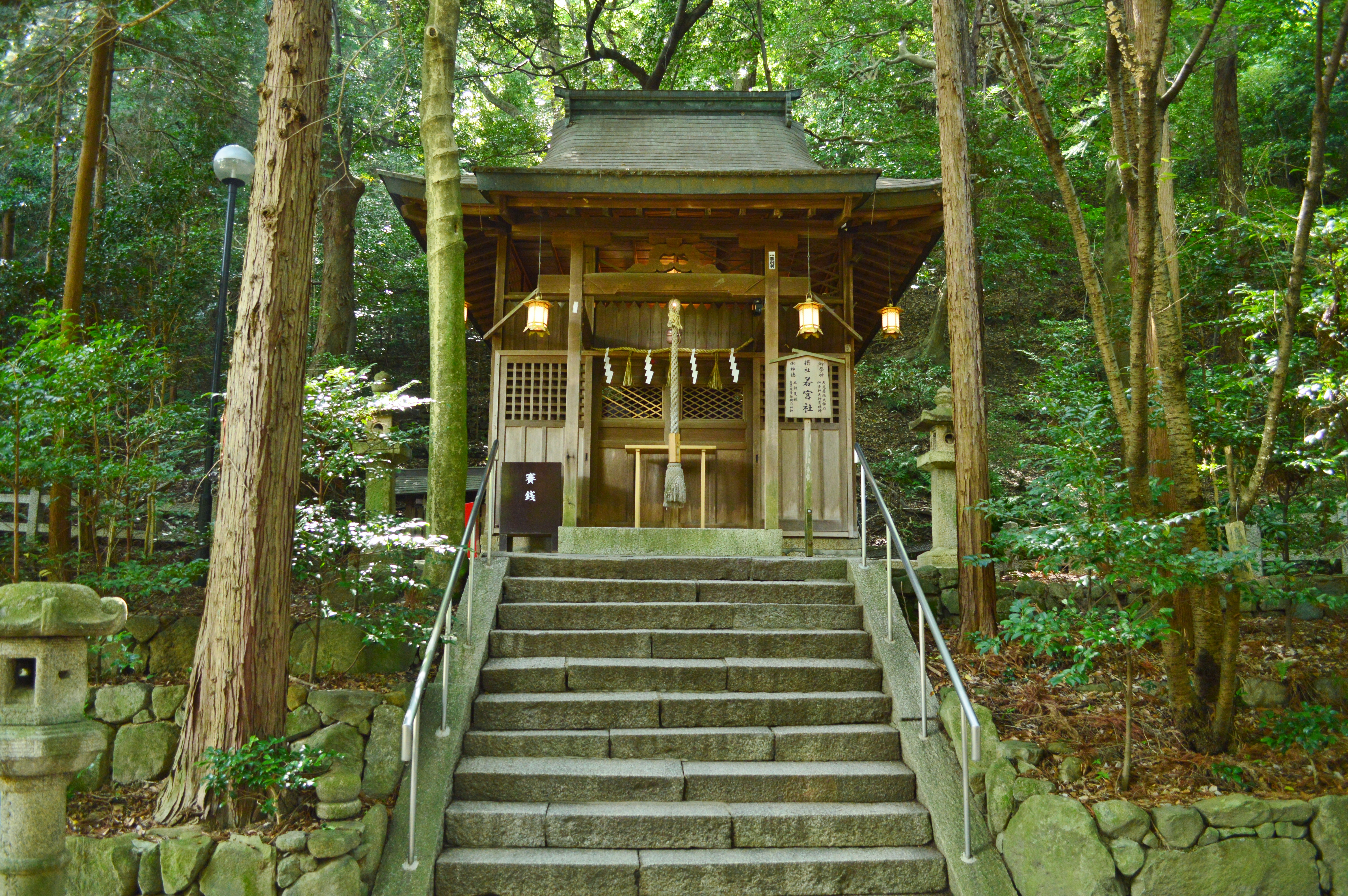 枚岡神社 境内若宮社